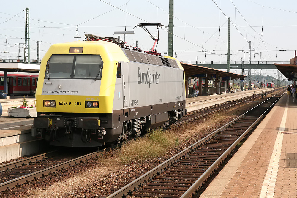 Dispolok ES 64 P 001 in Ingolstadt Hbf